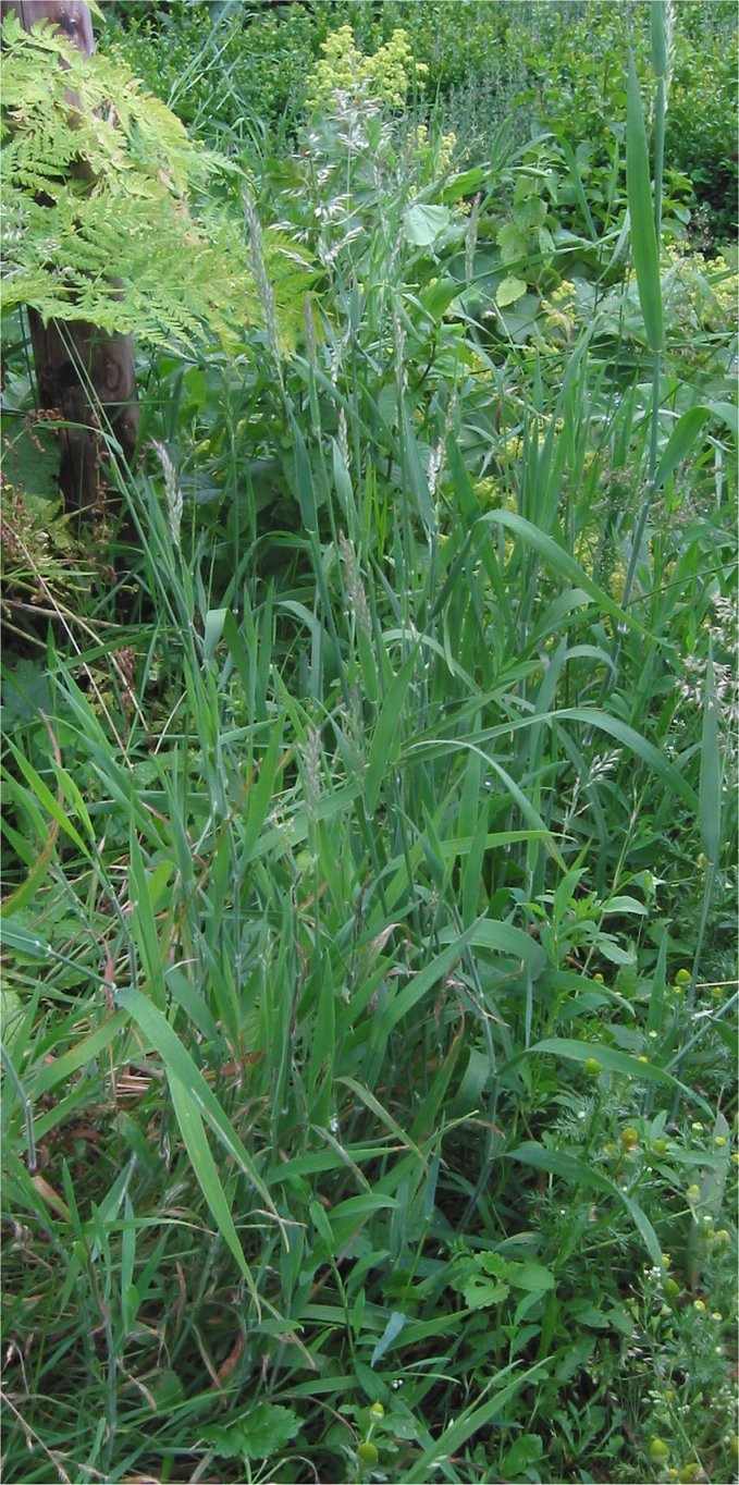 (Gladde witbol plant) Holcus mollis